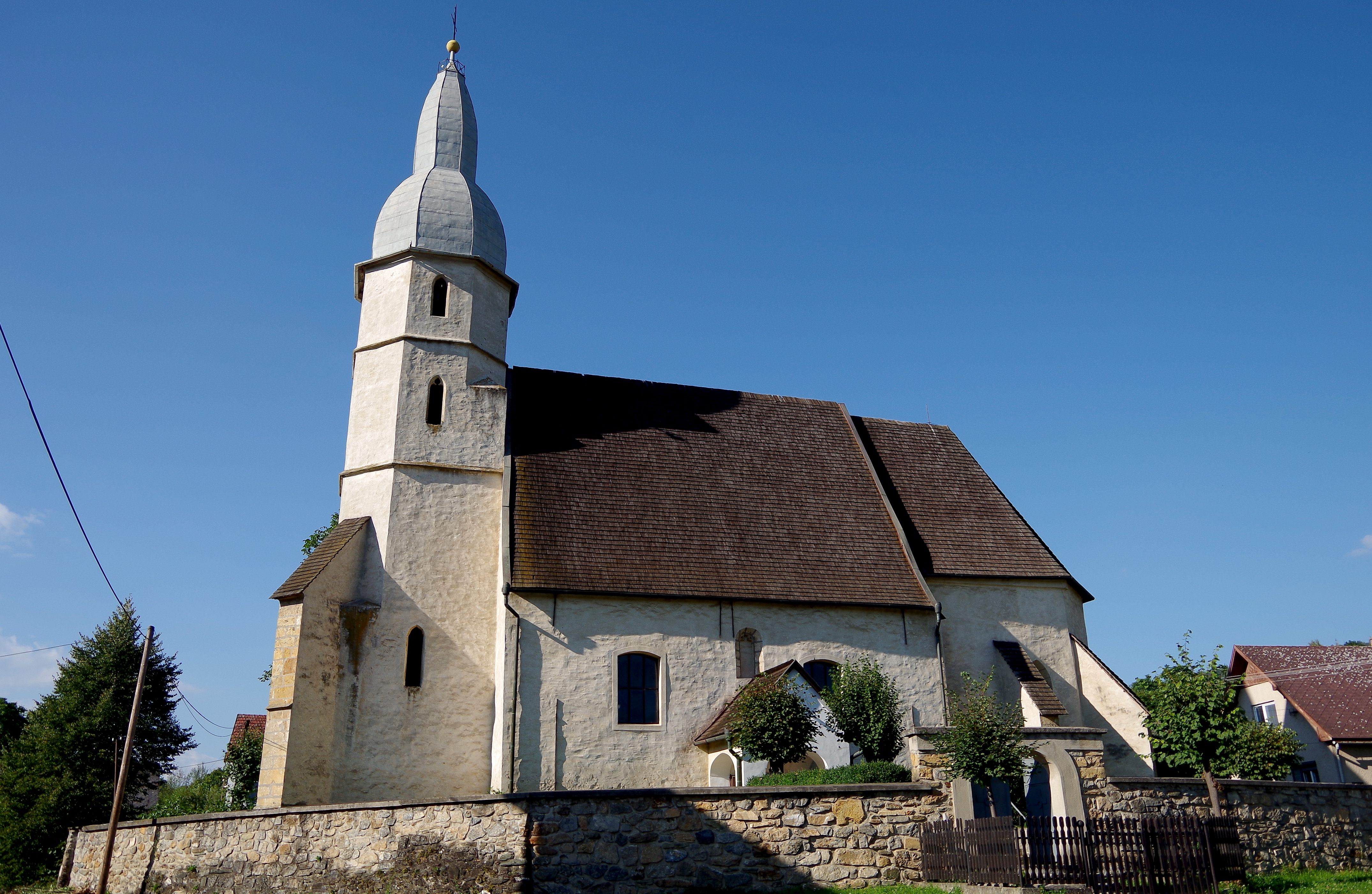 Gotický kostol Evanjelickej cirkvi a. v. v Kocelovciach. Vznikol v prvej štvrtine 14. storočia